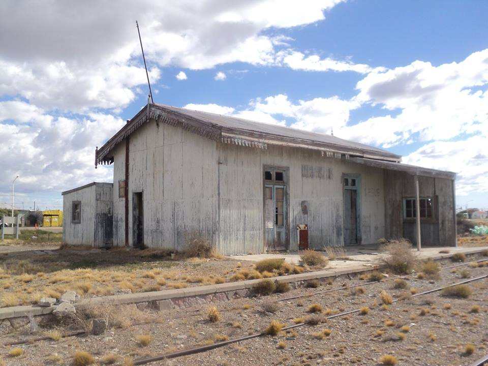 La estación del pueblo en correcta preservación, ya que está cerrada en su entrada principal, pero en desuso total